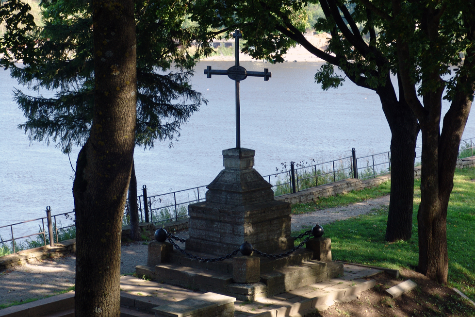 Крест в память о русских воинах, погибших во время Северной войны в 1704 году при штурме Нарвы